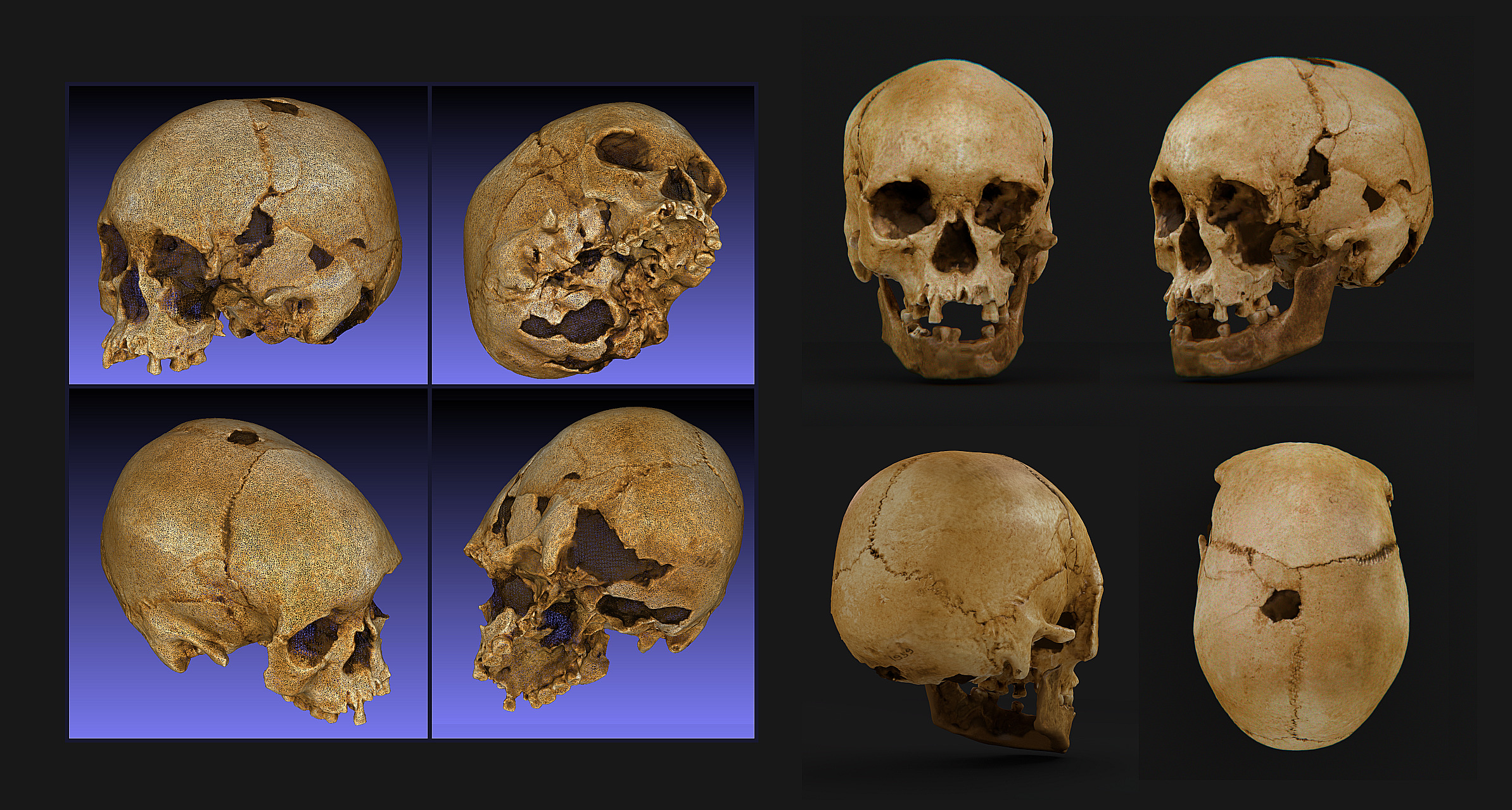 Digitalização 3D do crânio de Luzia feito com o PPT-GUI e o Blender 3D, a partir de fotografia tomadas pelo arqueólogo Dr. Moacir Elias Santos. À esquerda: Visão em wireframe com textura. À direita: Renderizações.